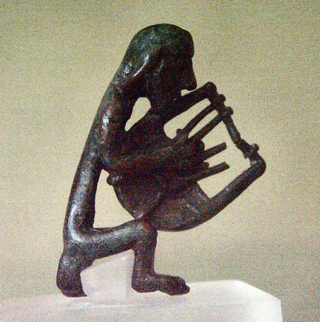 Motiv: Miniatur eines Kitharaspielers aus Kreta Ort: Archäologisches Museum, Iraklio, Kreta Kamera: Minolta Dimage 7 Hi